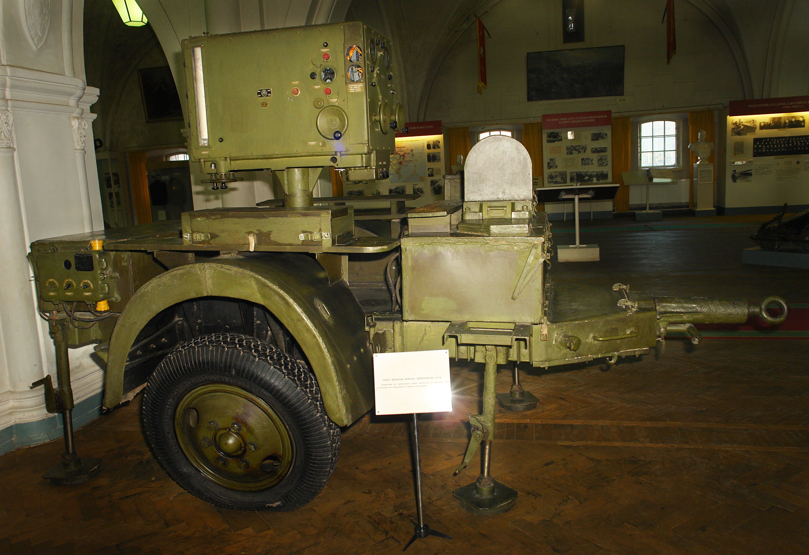 ПРИБОР УПРАВЛЕНИЯ ЗЕНИТНЫМ АРТИЛЛЕРИЙСКИМ ОГНЕМ. Предназначен для преобразования данных, поступающих по синхронной связи от дальномера или радиолокатора, и передачи их на орудие. Военно-исторический музей артиллерии, инженерных войск и войск связи, Санкт-Петербруг